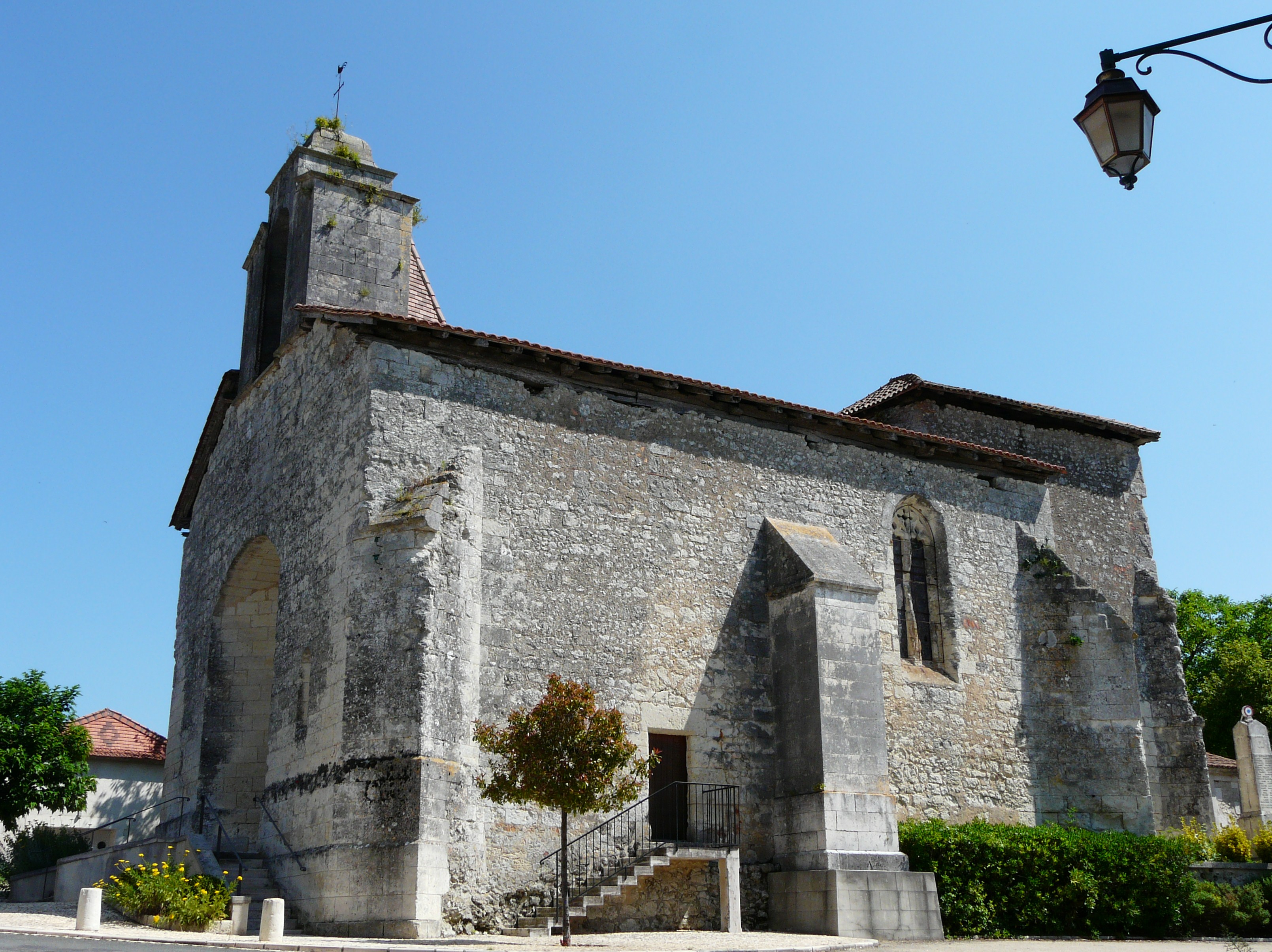 L'église Saint-Pardoux, Saint-Pardoux-de-Drône, Dordogne, France.